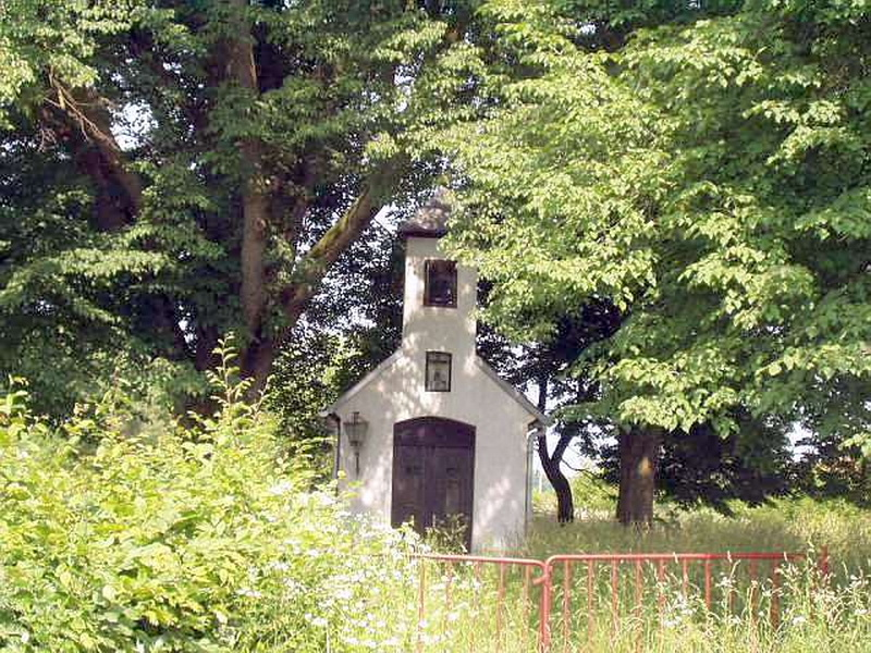 Dubravski Markovac - 1935's Chapel